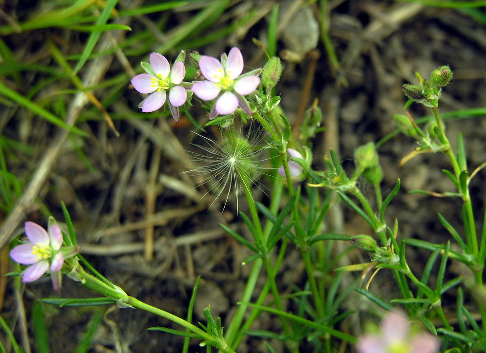 Rausvoji posmiltė (Spergularia rubra) Šeima. Gvazdikiniai (Caryophyllaceae) Foto: Algirdas, 2006 m. birželio 3 d., Lietuva